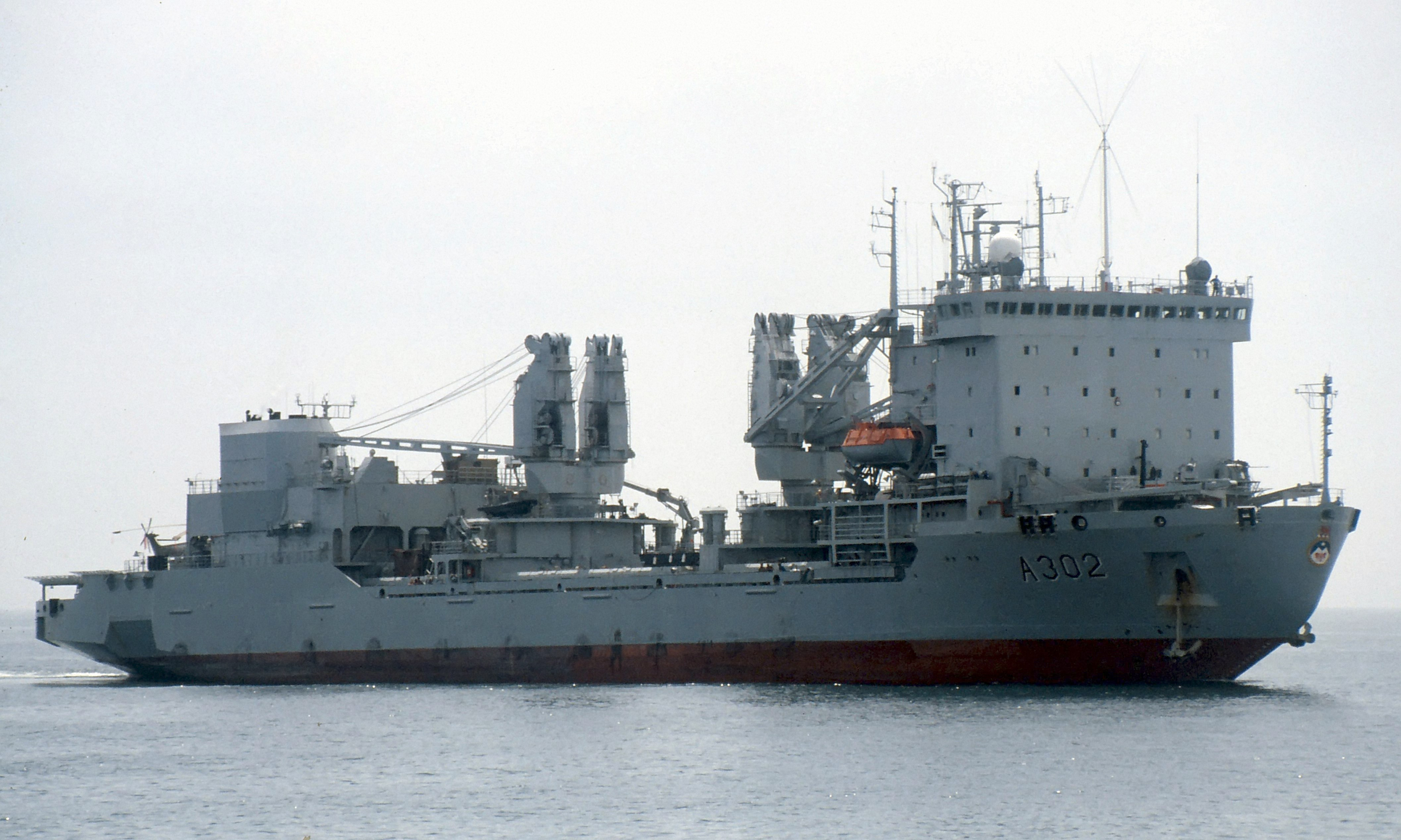 The SAS Outeniqua